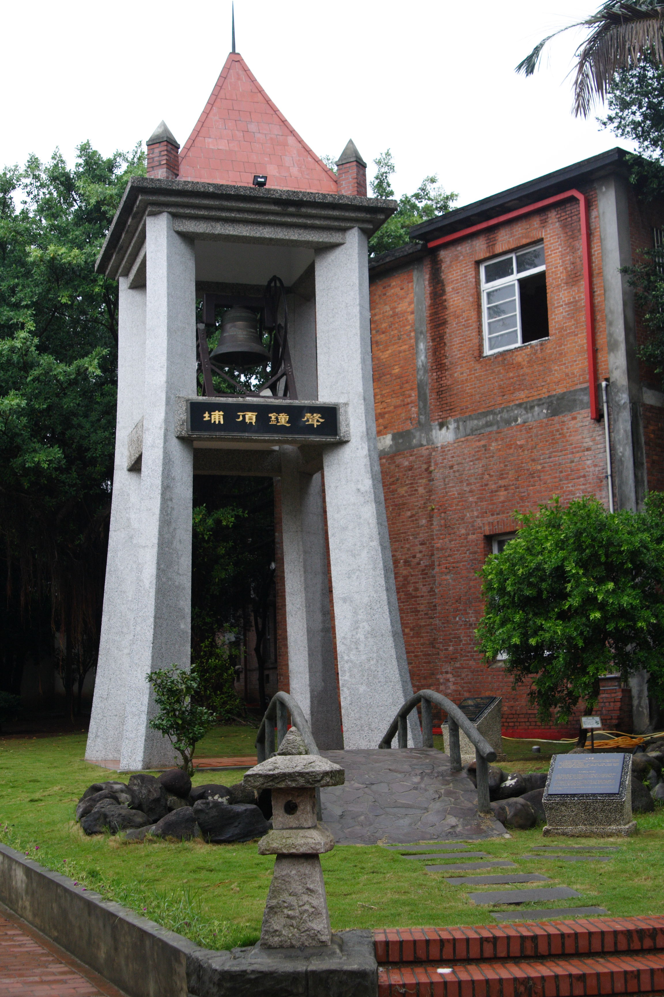 淡江高級中學埔頂鐘聲，User:Weihao.chiu拍攝。